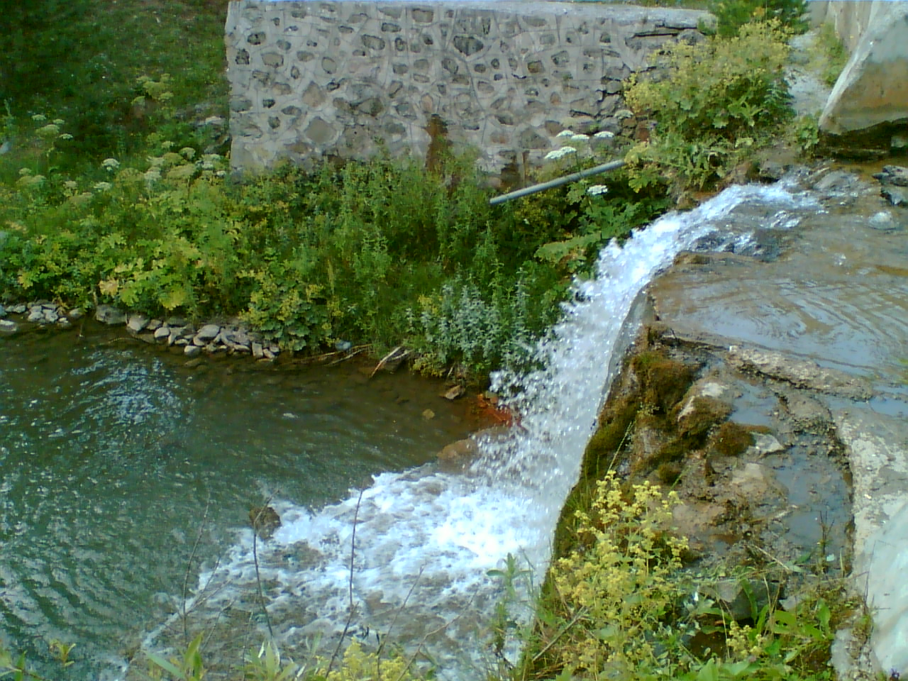 çukurhan